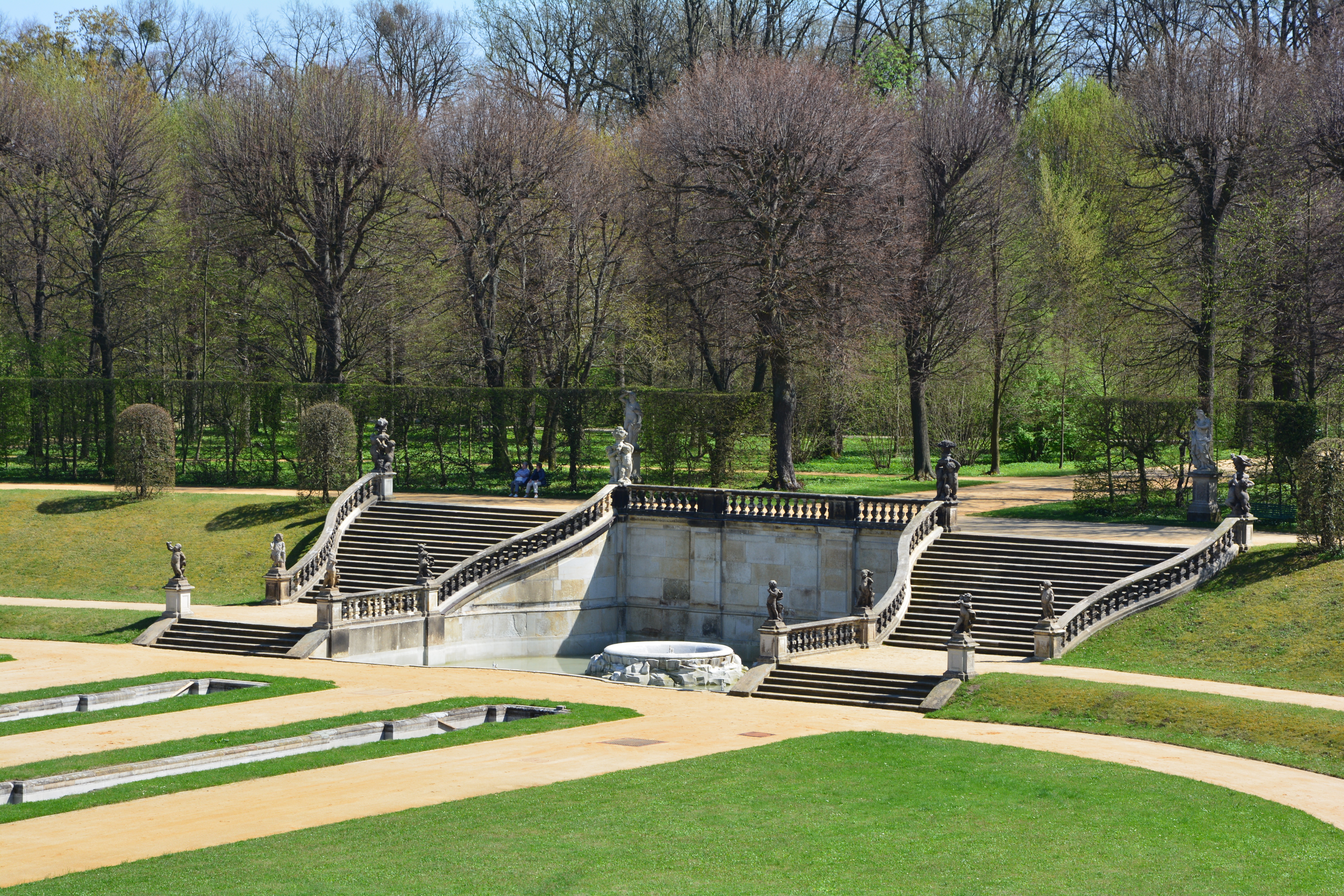 Barockgarten Großsedlitz